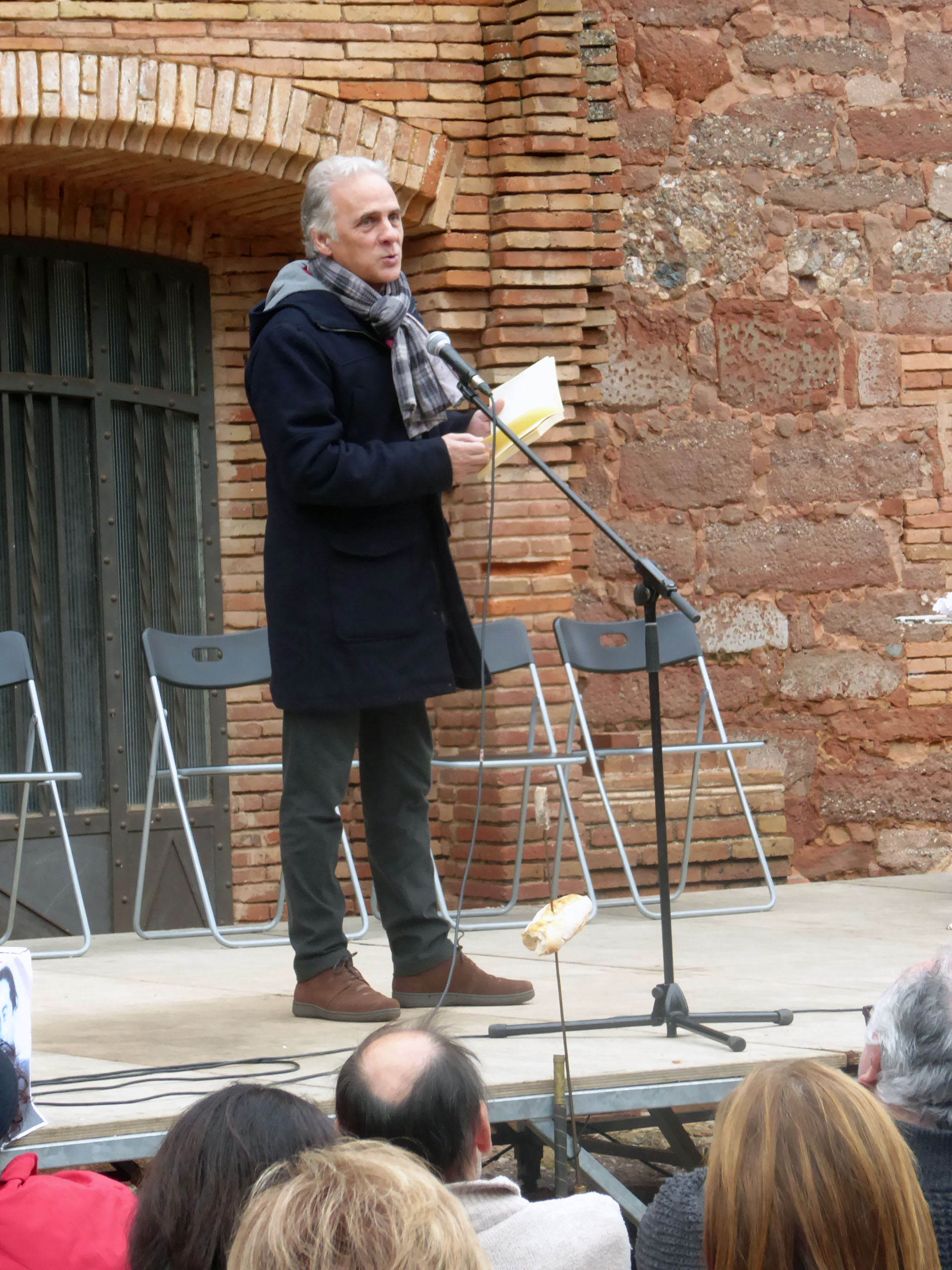 Miquel Desclot, en un vermut poètic en homenatge a Pere Quart al Marquet de les Roques